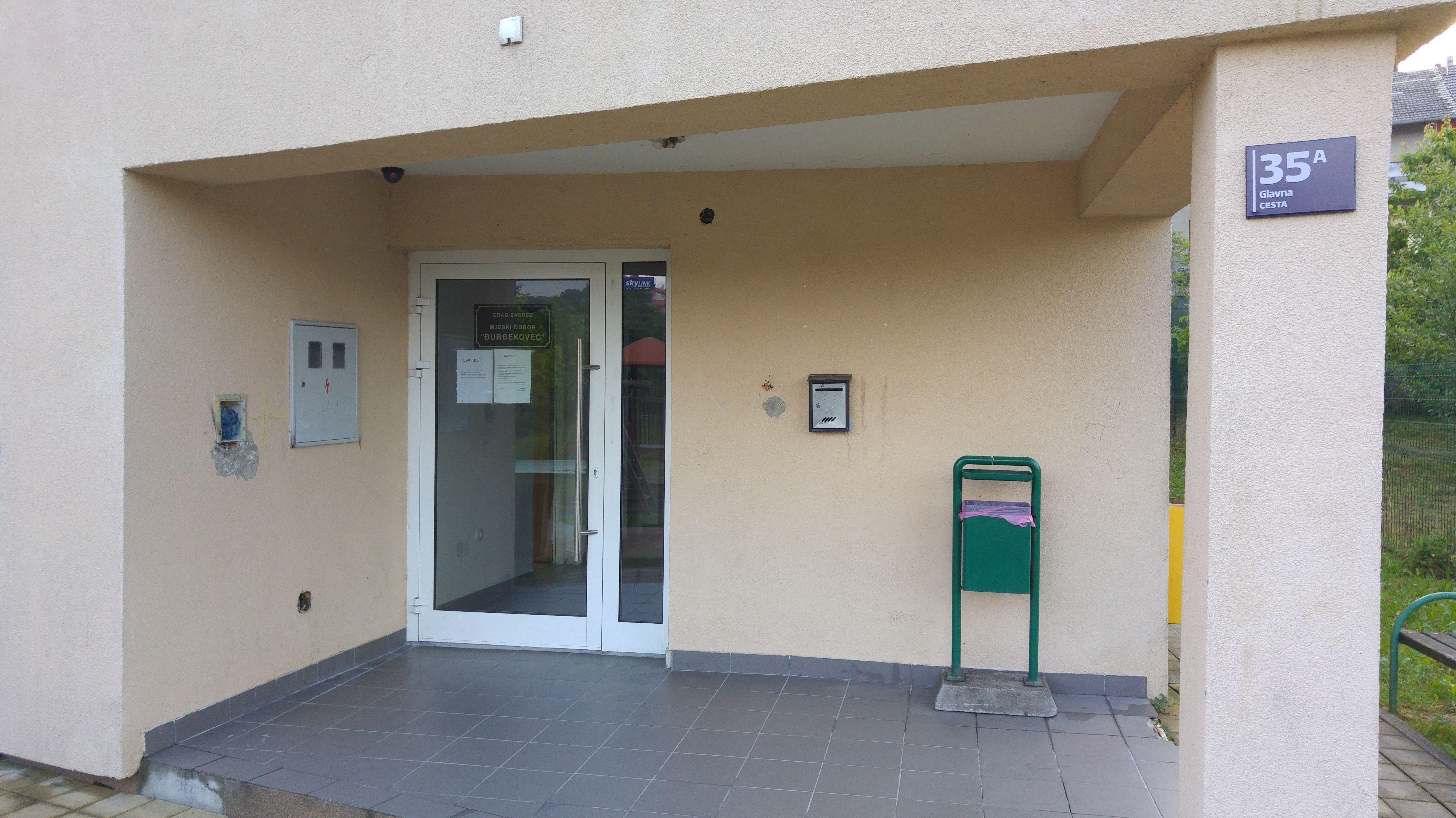 Sjedište: Mjesni odbor Đurđekovec